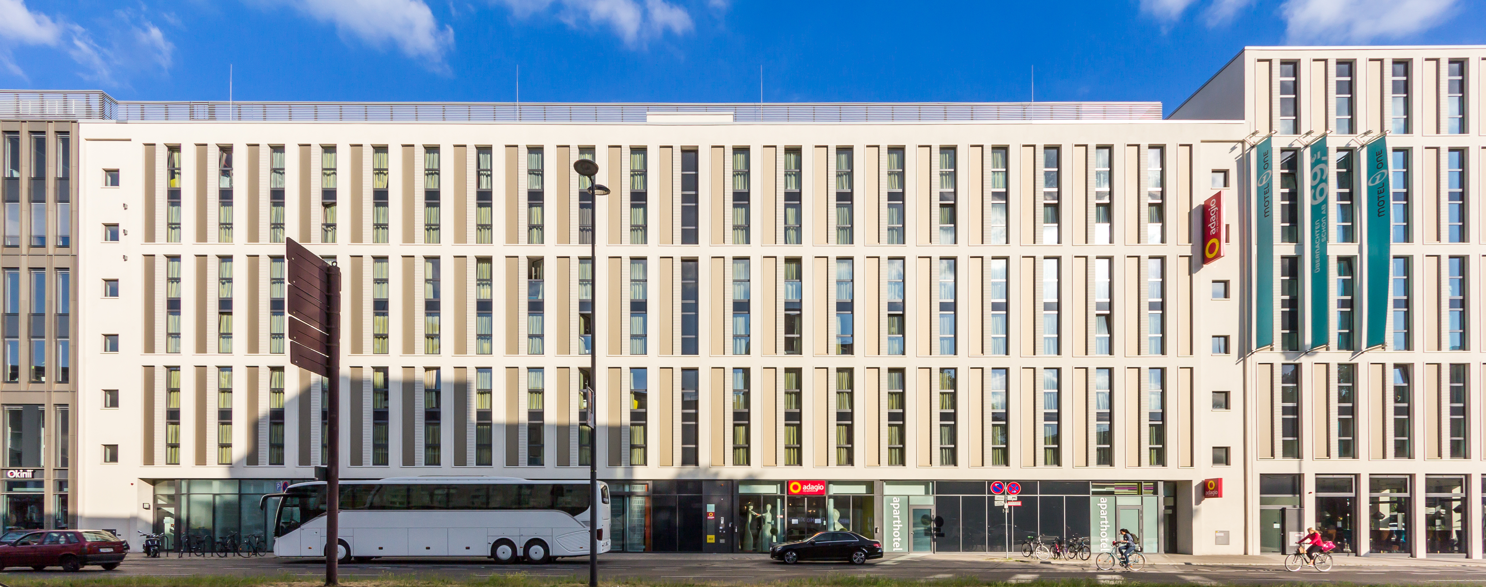 Adagio Aparthotel Köln City, Blaubach 3, Köln. Rechts daneben befindet sich das Motel One Waidmarkt